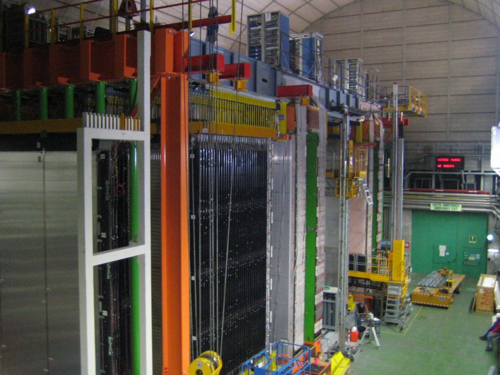 Foto des OPERA-Detektors während der Aufbauphase